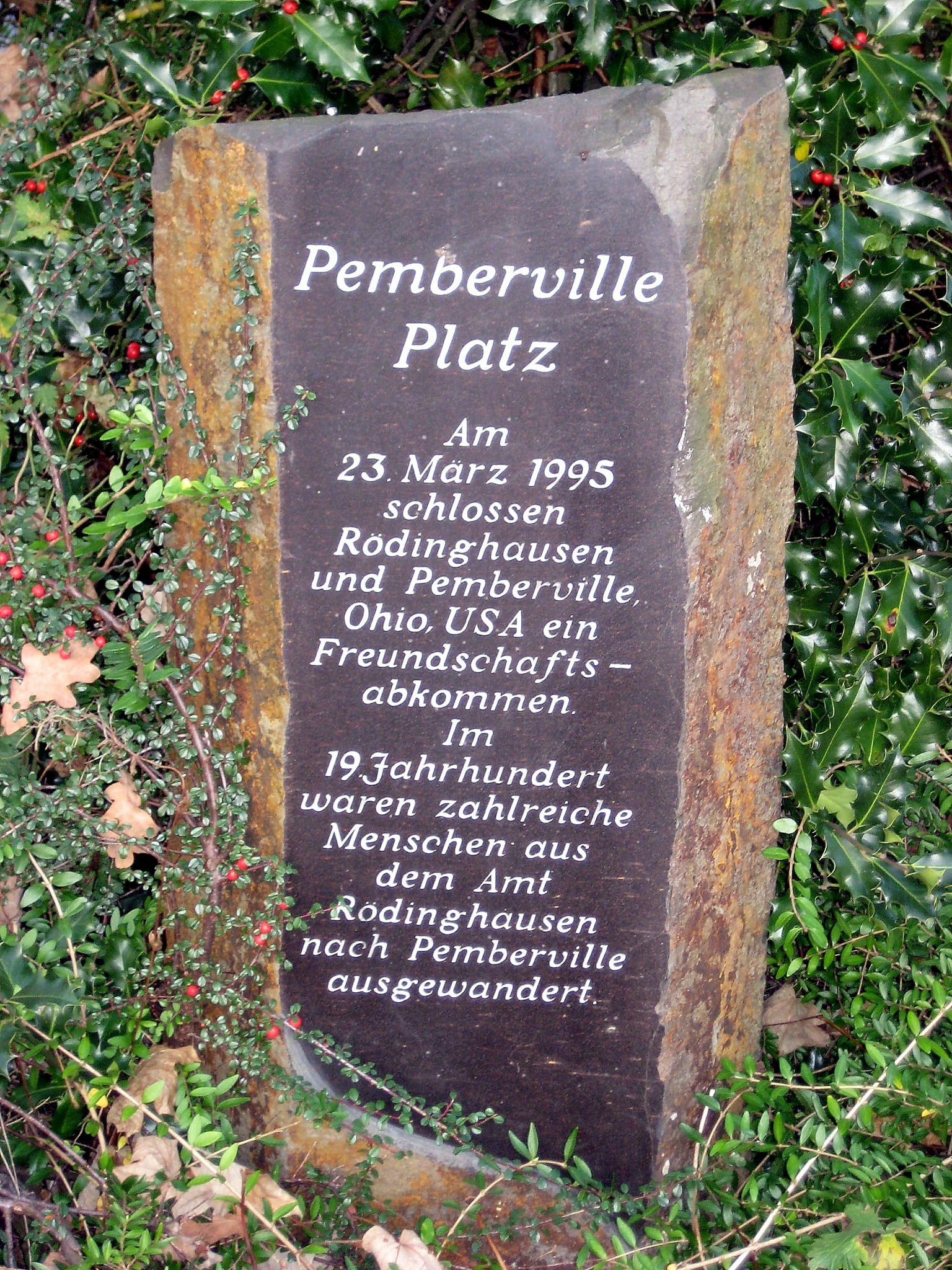 Pemberville-Denkmal in Rödinghausen, Kreis Herford, Nordrhein-Westfalen.